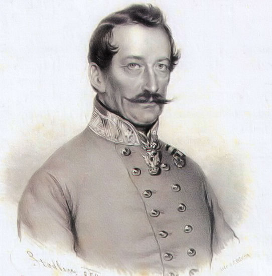 Franz Wyss (1796–1849) császári és királyi vezérőrnagy